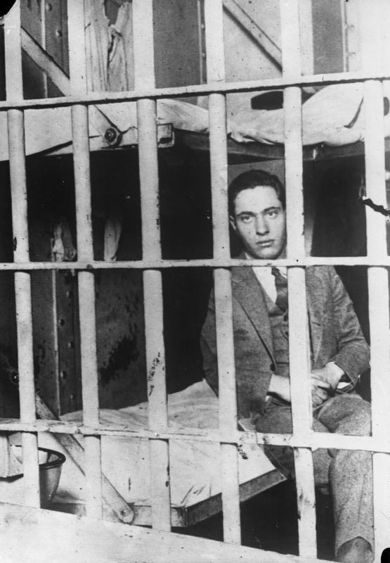 Der Millionärs-Sohn Nathan Leopold im Zuchthaus Sing-Sing! Der jetzt 25 jährige Millionärs-Sohn Nathan Leopold, welcher vor 5 Jahren seinen 14 jährigen Spielkameraden Robert Frank ermordete, kämpft um seine Begnadigung. Die seinerzeit beantragte Todesstrafe wurde in lebenslängliches Zuchthaus umgewandelt.